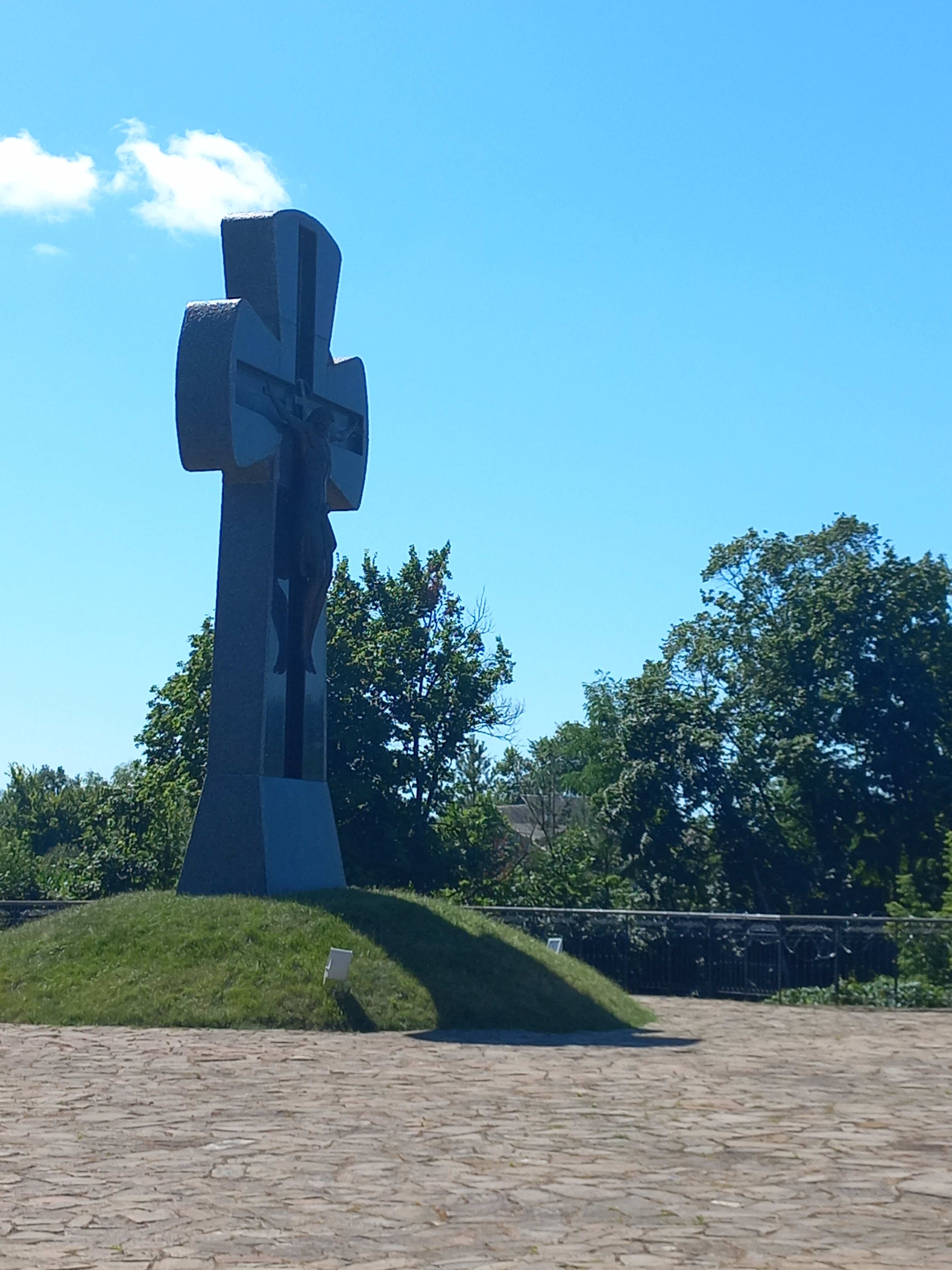 Пам'ятник жертвам Батуринської трагедії 1708 року, Батурин, вул. Партизанська